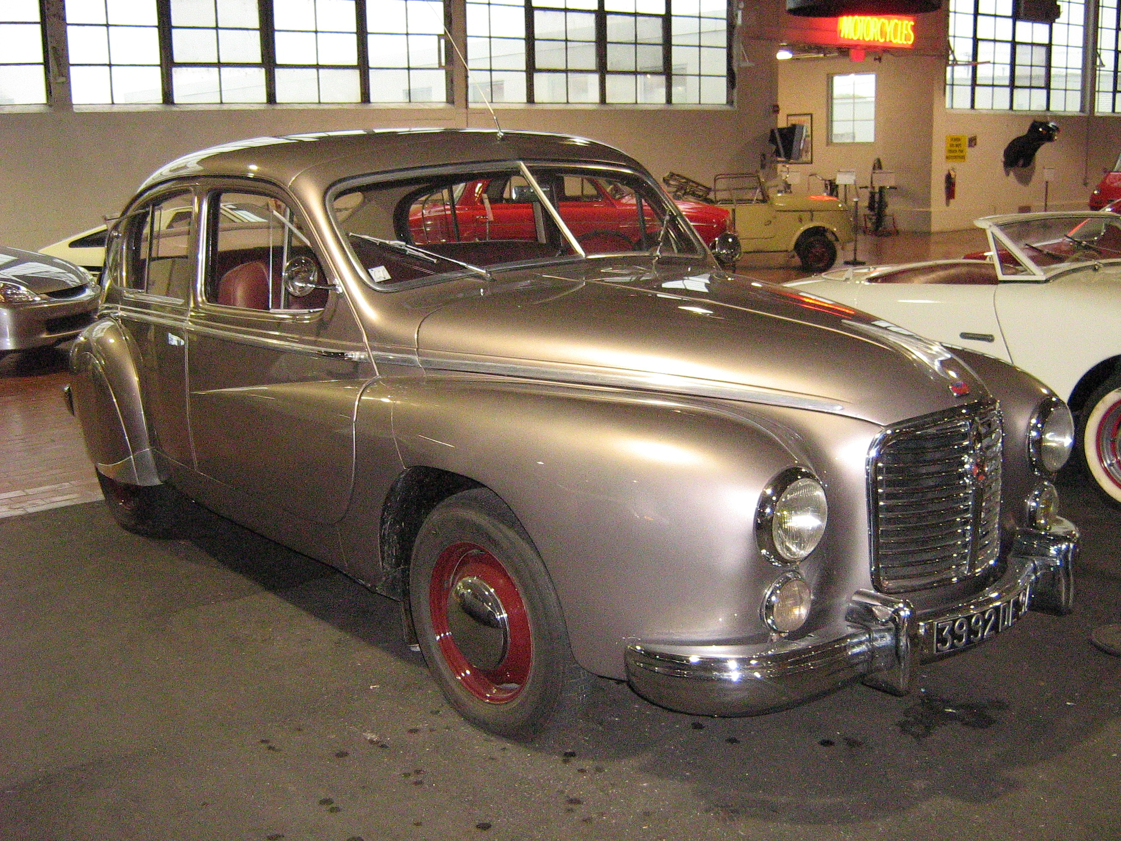 1951 Hotchkiss